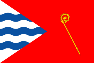 Bandera Valverde-Enrique